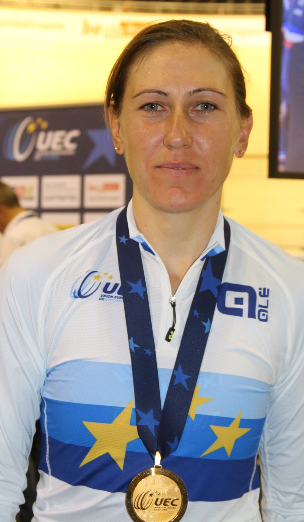 Silvia Valsecchi, ital. Radsportlerin